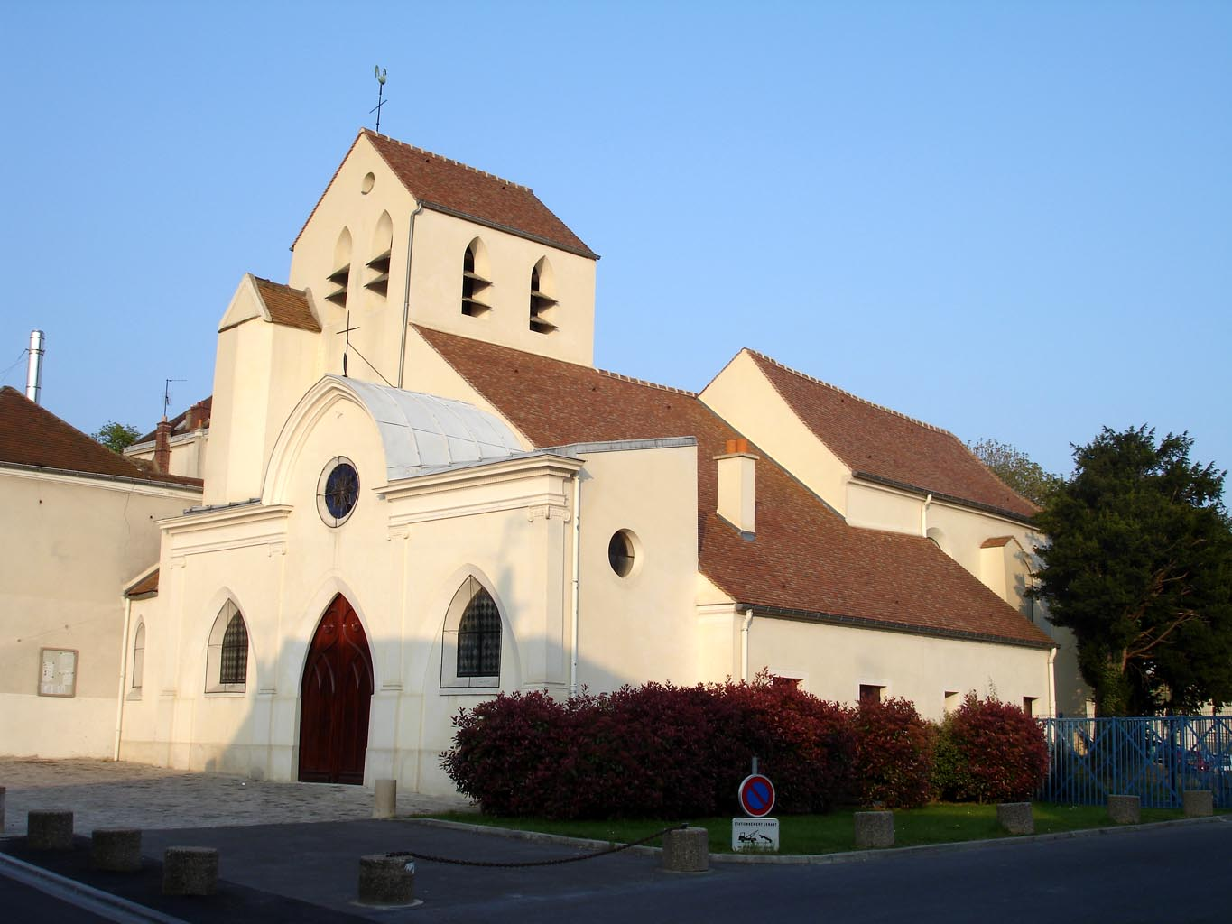 Eglise de Margency - Val-d'Oise (France)